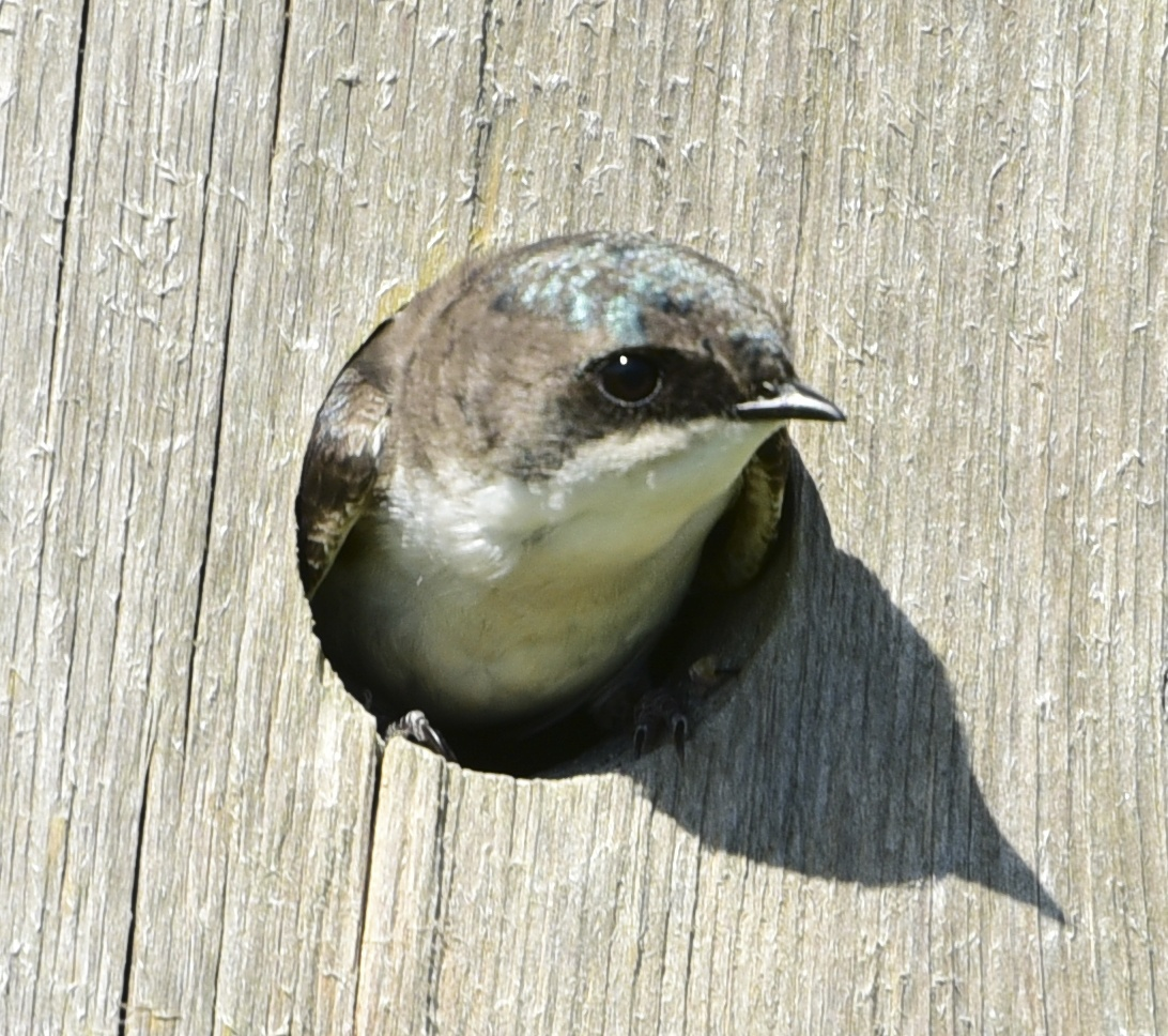 Самиця 1-го року білозорки річкової (Tachycineta bicolor) визирає з пташиного будиночка в парку Полковника Семюела Сміта в Торонто